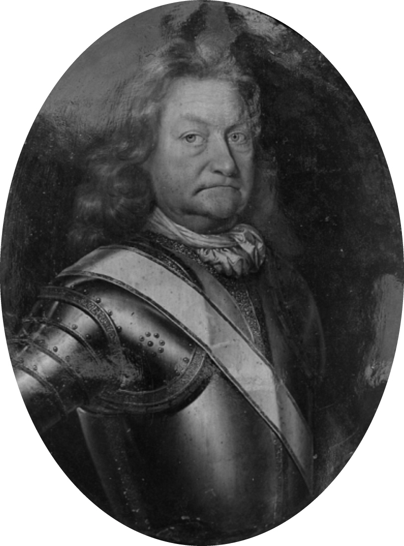 Heinrich Hildebrand von Einsiedel (1658-1731), Governor of Altenburg